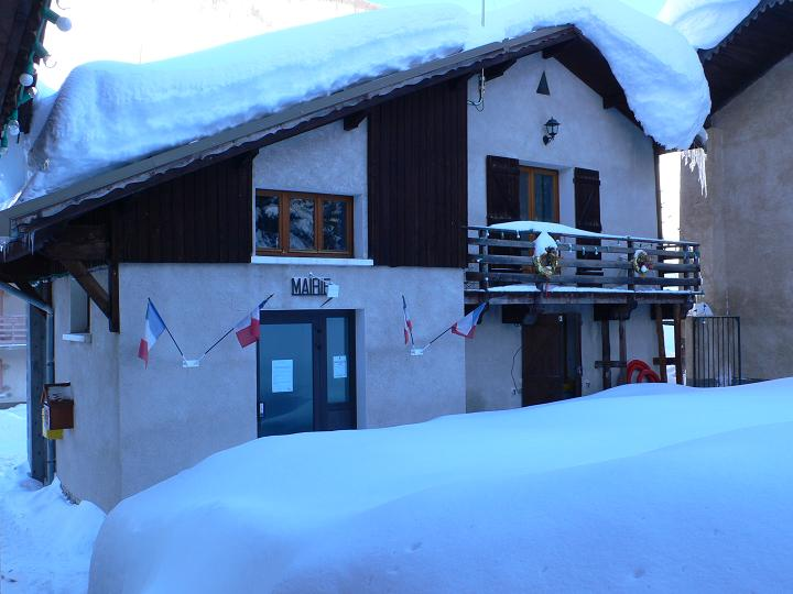 Ristolas - Mairie